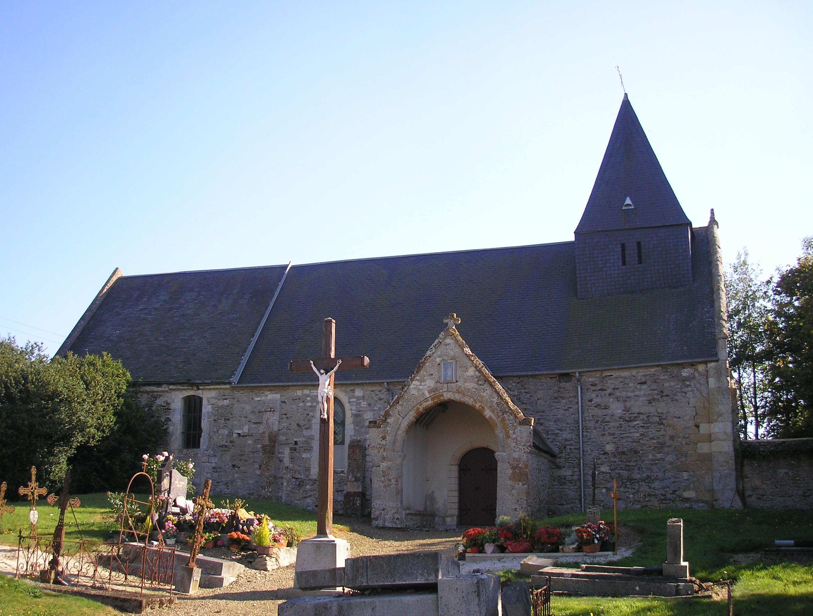 Le Mesnil-au-Grain (Normandie, France). L'église Saint-Ouen.